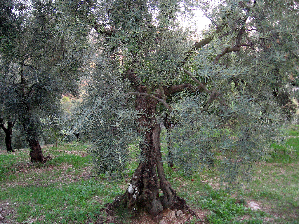 olivo Pciarl